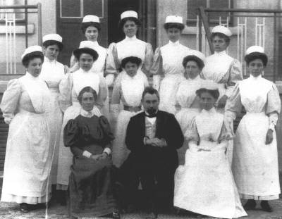 Antoine Depage, Edith Cavell et une partie de l'équipe d'infirmières de l'institut médicochirurgical d'Uccle